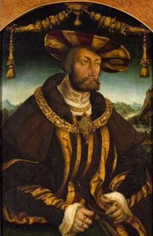 Herzog Wilhelm IV. von Bayern (1493 - 1550)